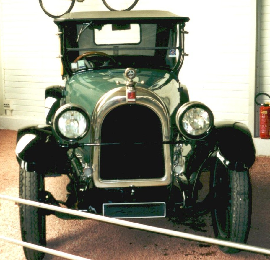 Stephens Salient Six Roadster von 1922 im Automusée du Forez.